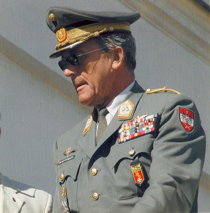 Jahrgangstreffen an der TherMilAk